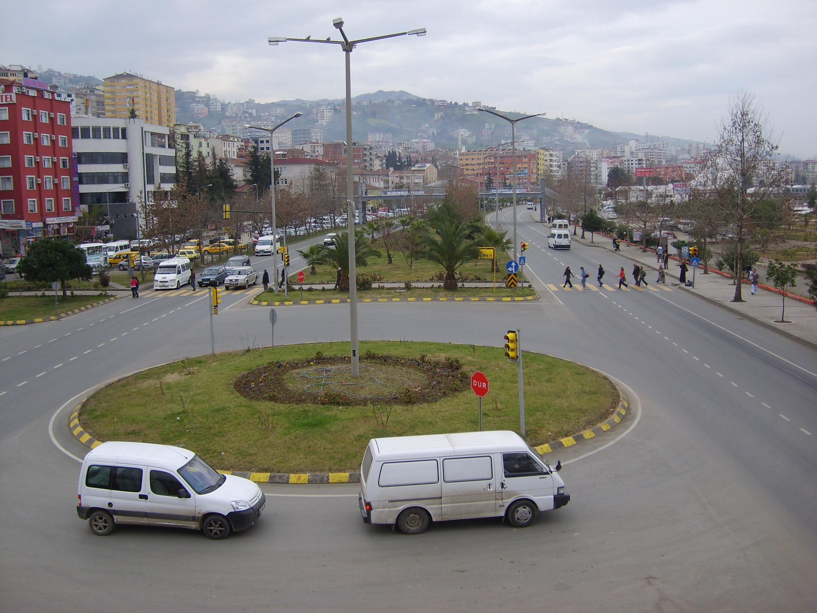 Üstgeçitten Akçaabat...